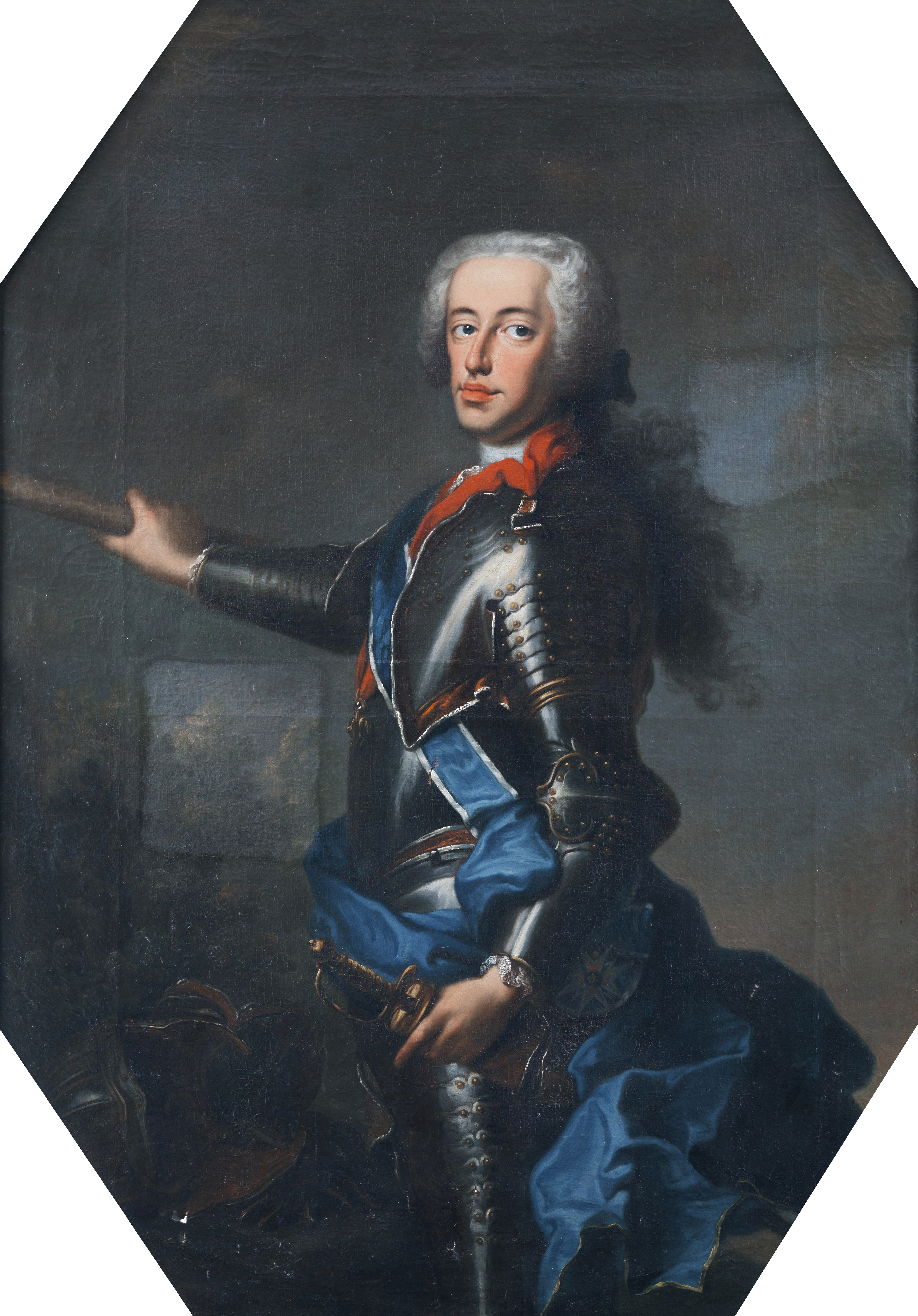 Kurfürst Karl Albrecht von Bayern (1697-1745)